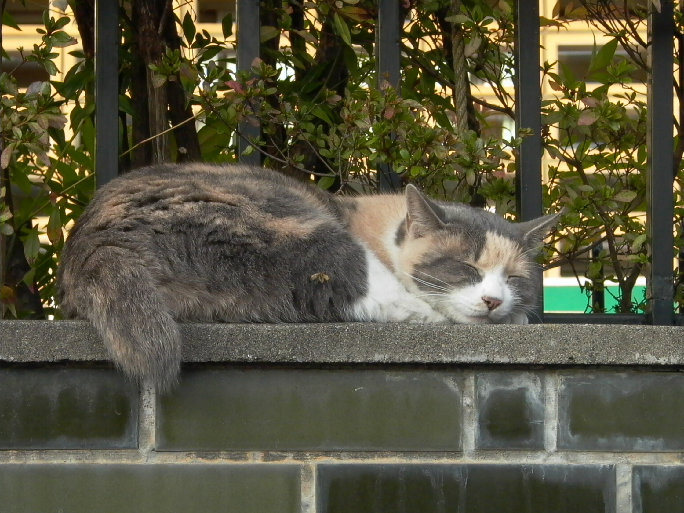 青梅鉄道公園園長（ただし写真は就任3年前の姿）